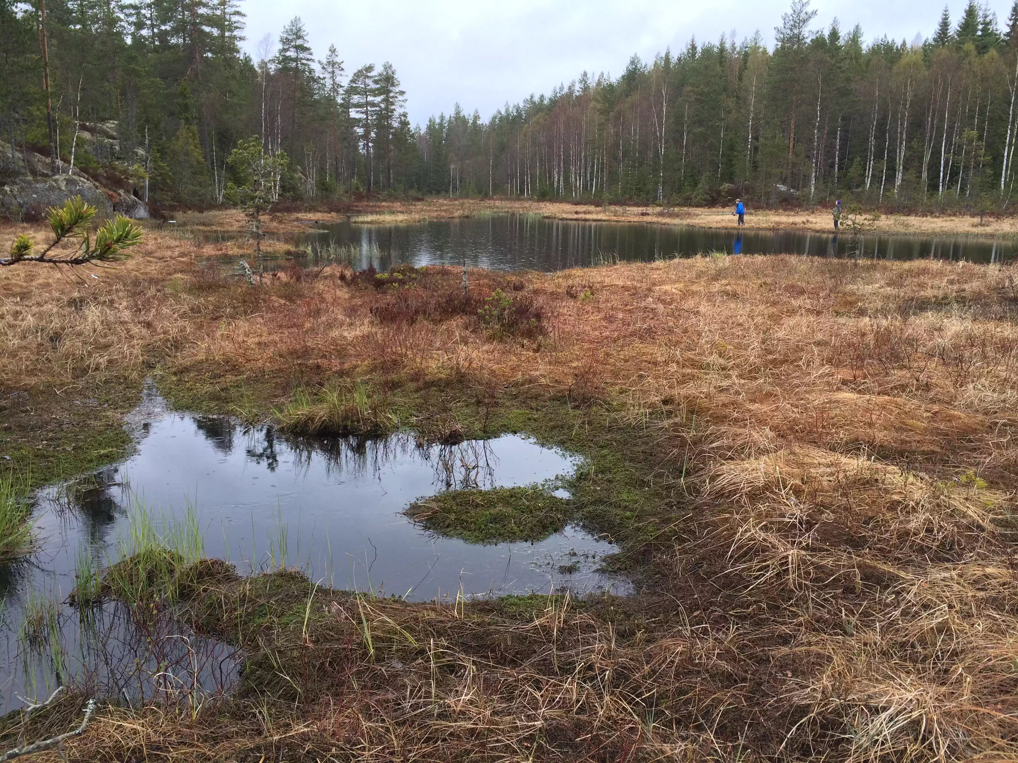 Det minste av de tre Piltjerna på Lierfoss i Aurskog-Høland kommune.